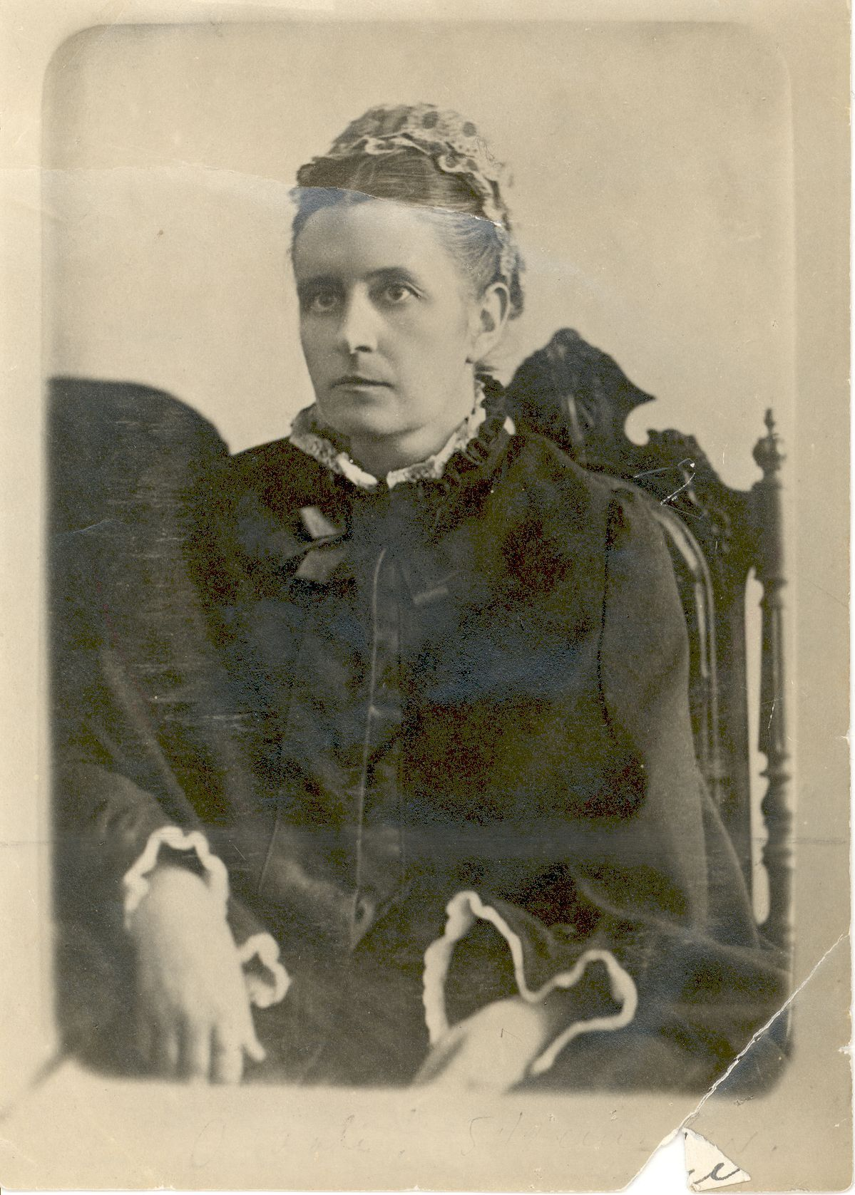 Lydia Koidula